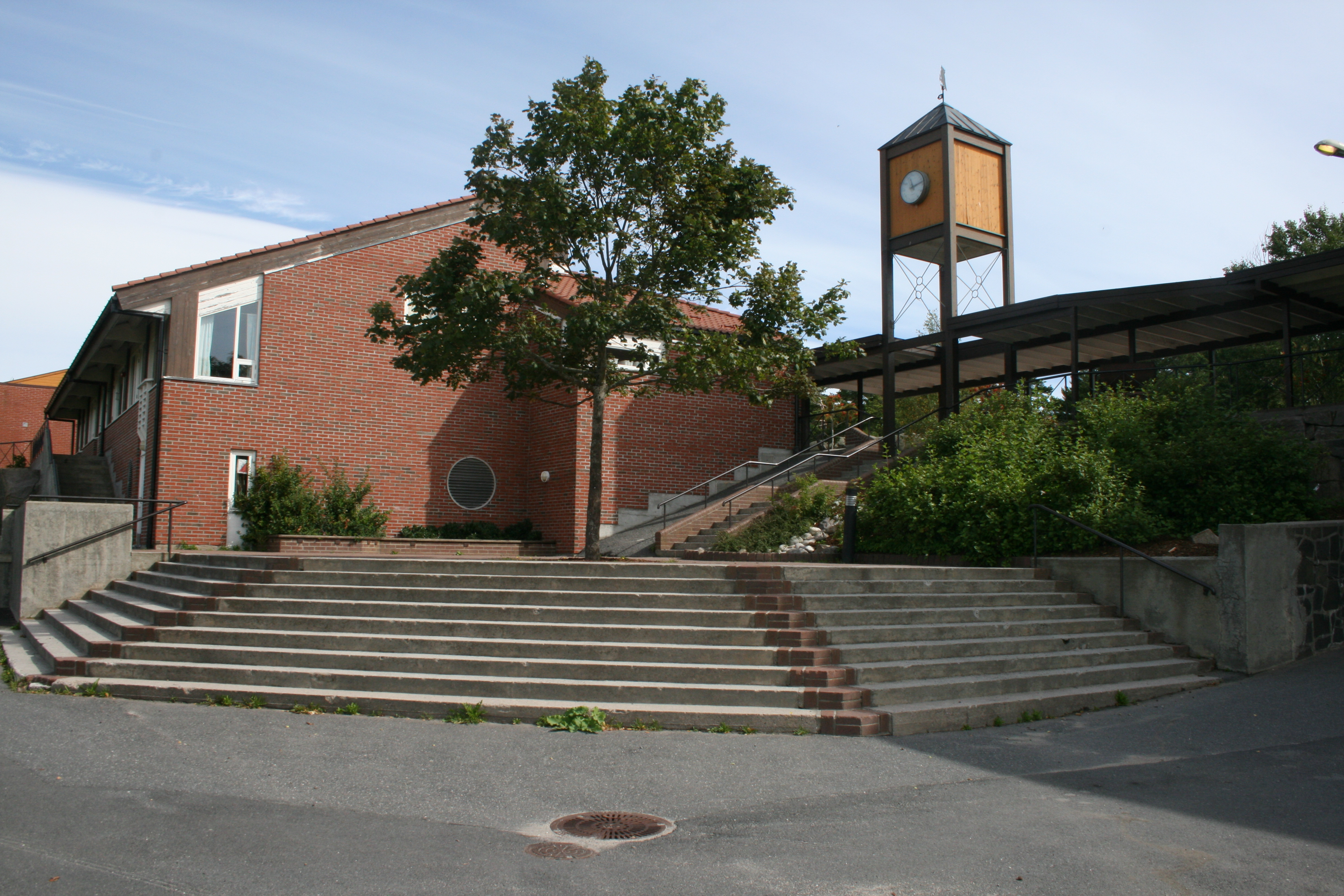 Risør barneskole på Kjempesteinsmyra på Randvik i Søndeled